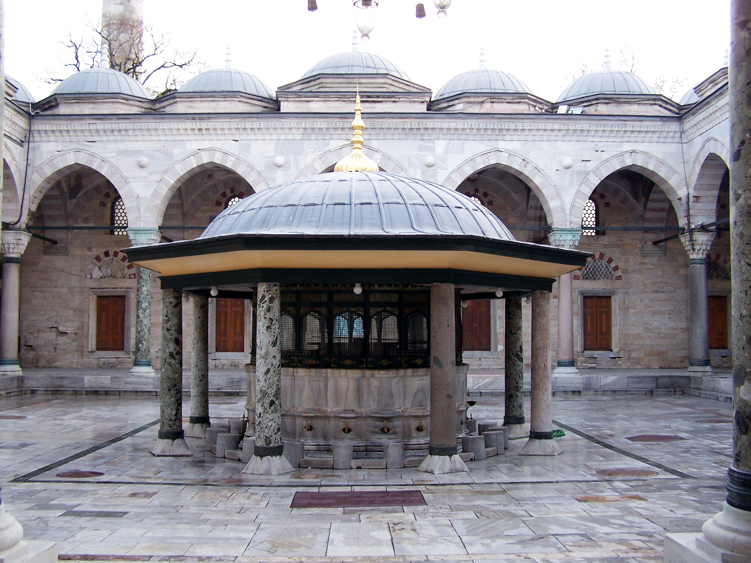 Şadırvan of Sultan II Beyazıt Camii